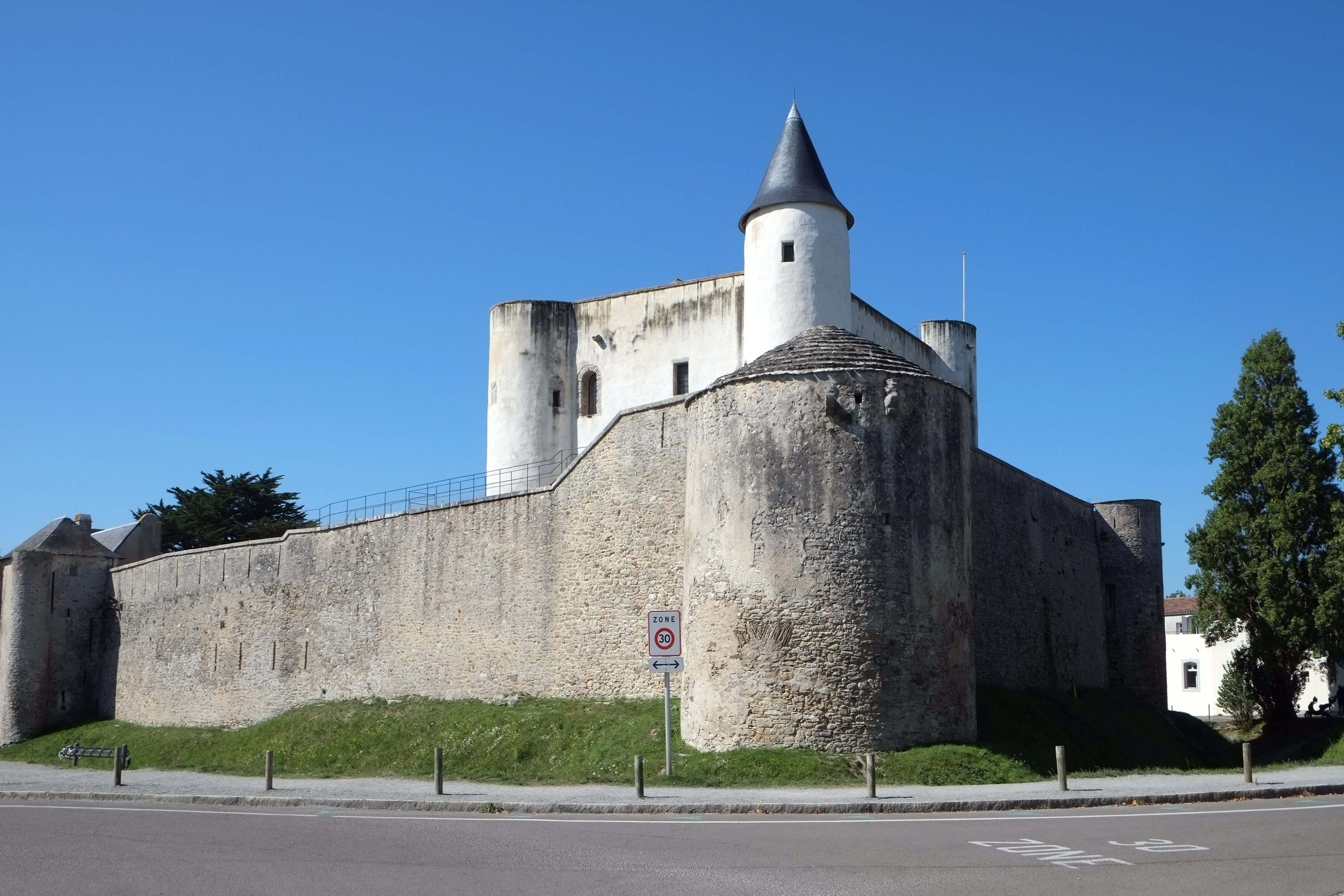 Château de Noirmoutier Vendée France